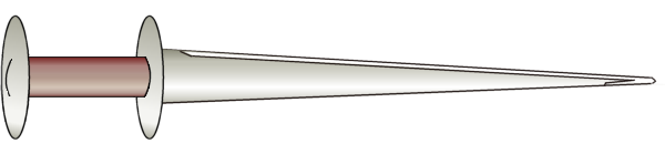 Rondel (dagger)